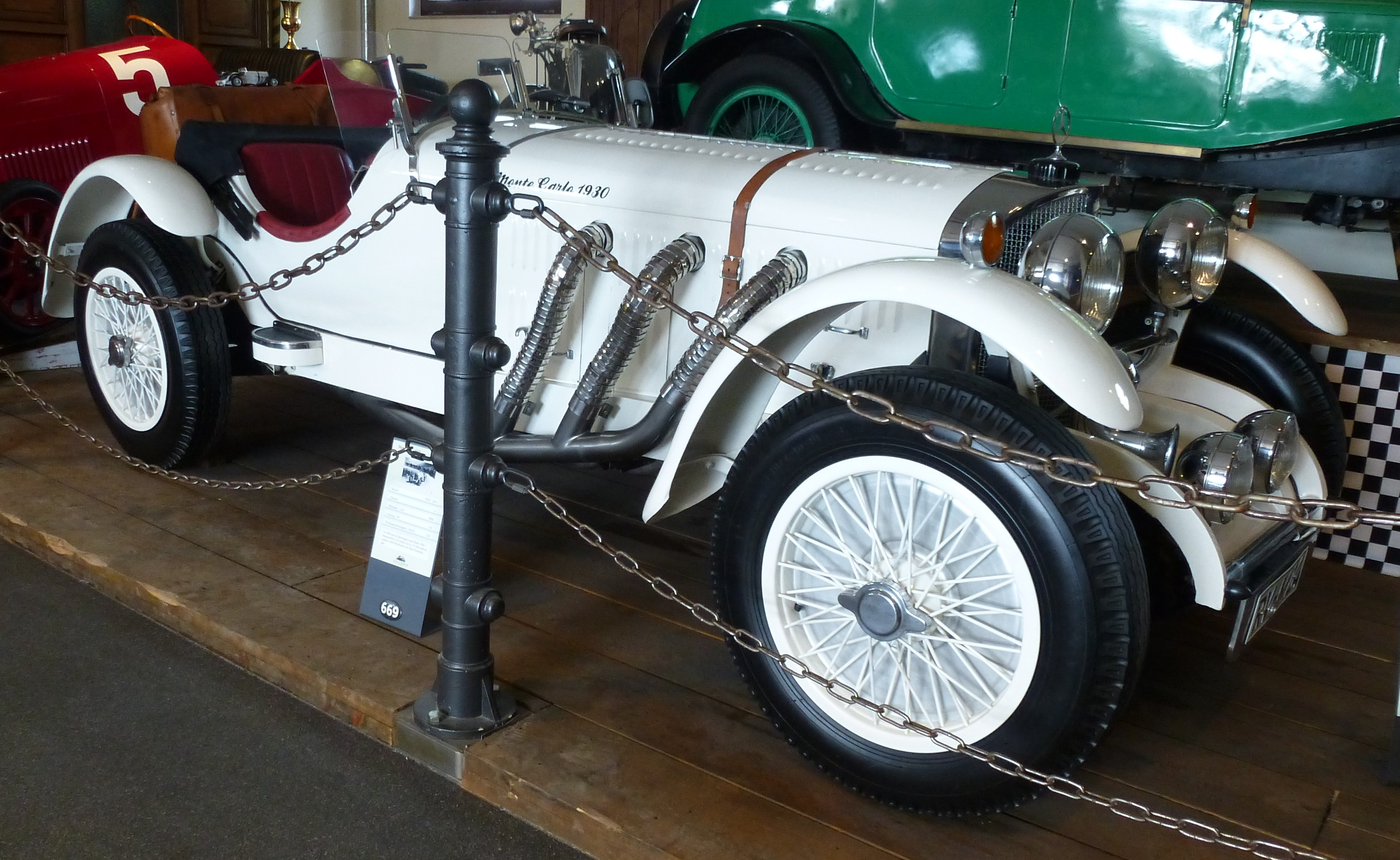 Torrelaro